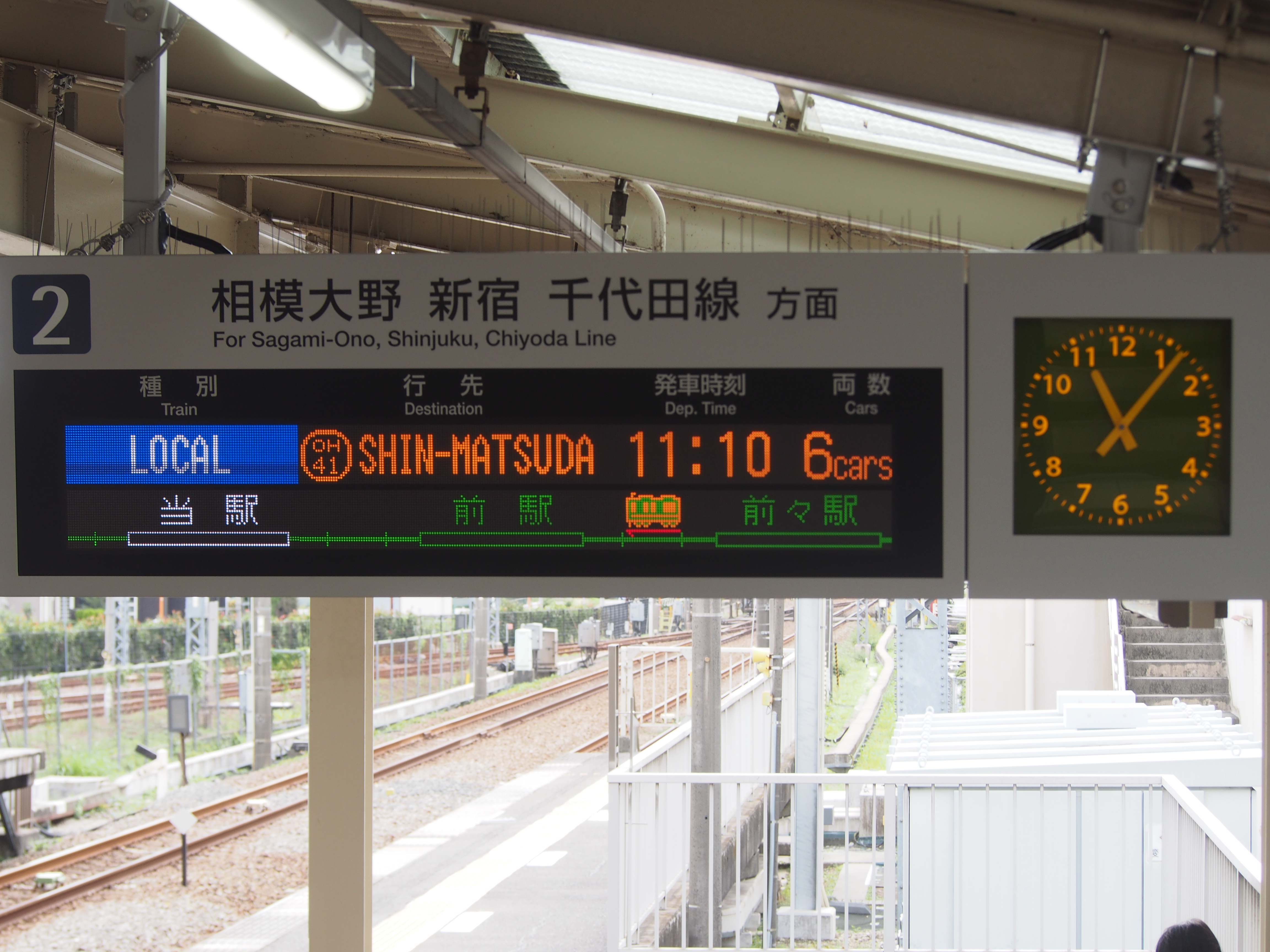 上りホームに設置された新型の案内表示器